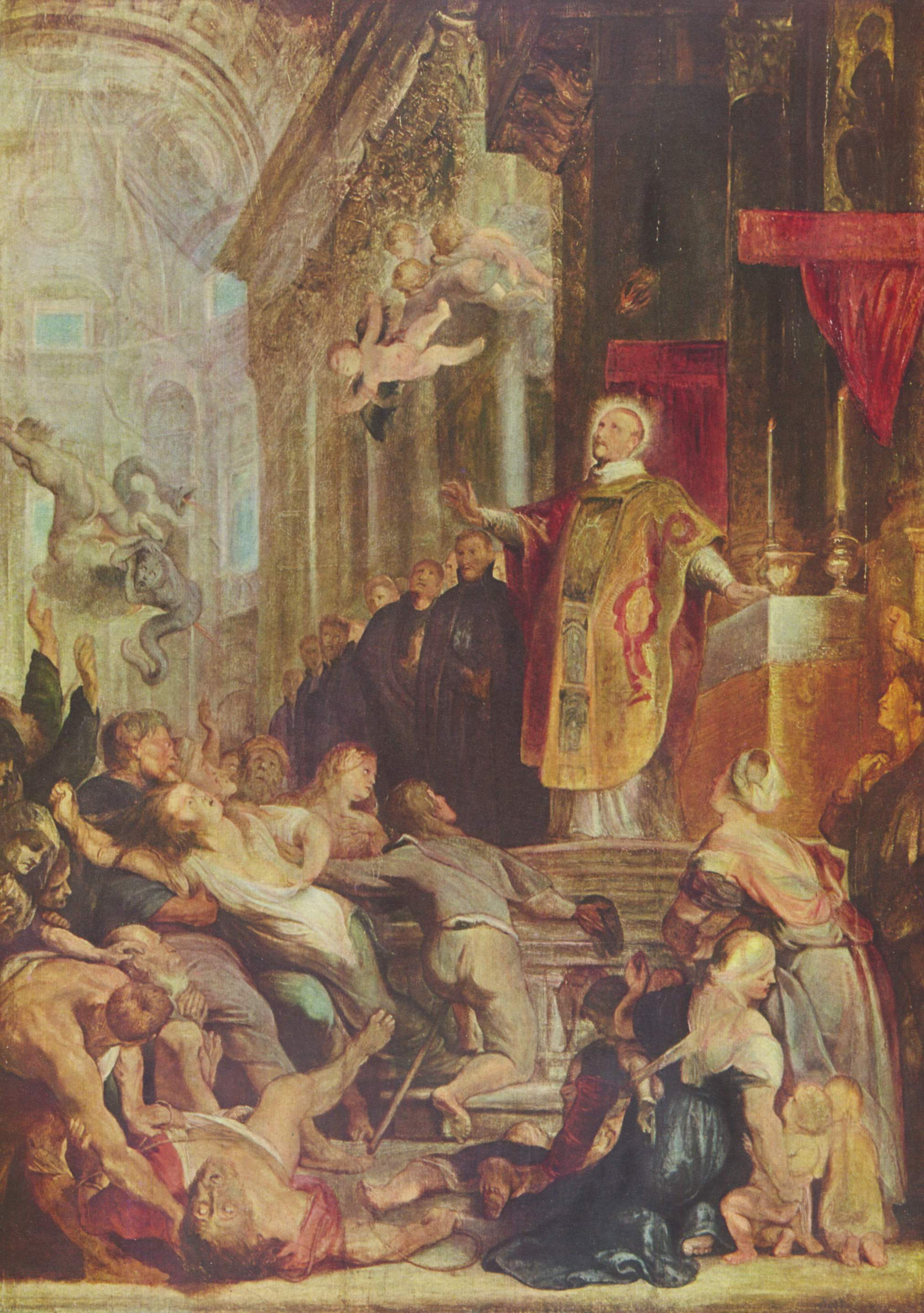 Study for File:Peter Paul Rubens33.jpg